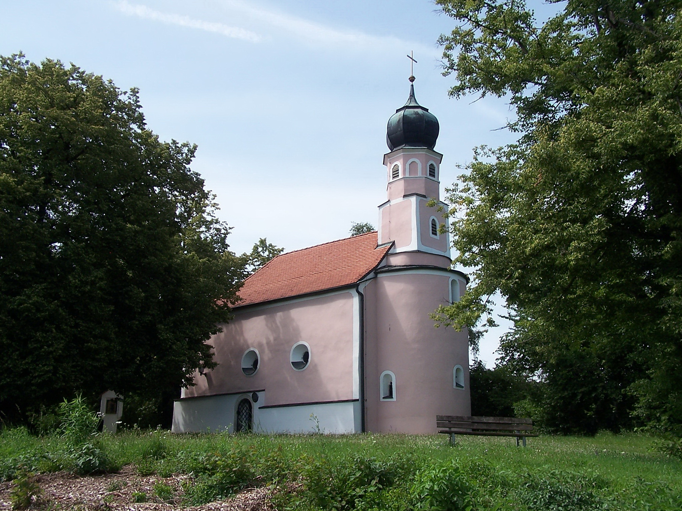 Wörth an der Donau. Tiefenthal. Kath. Nebenkirche und ehem. Burgkapelle St. Ulrich und Wolfgang. Saalbau mit eingezogener Apsis und Chortürmchen mit Zwiebelhaube und Putzgliederungen, um 1200, Türmchen 17. Jh.